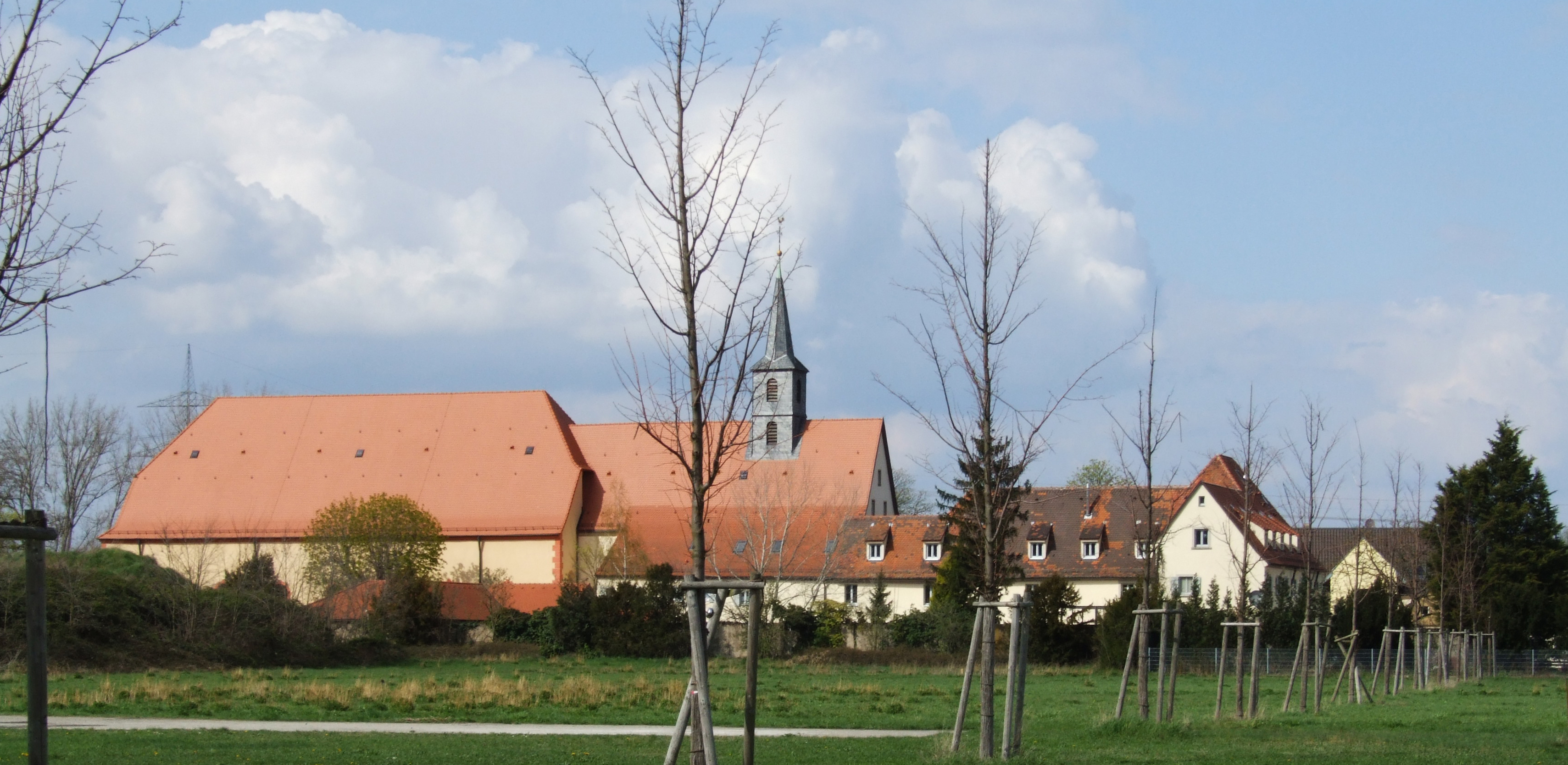 Kloster Waghäusel, von Süden der Eremitage aus fotografiert, Waghäusel, Germany